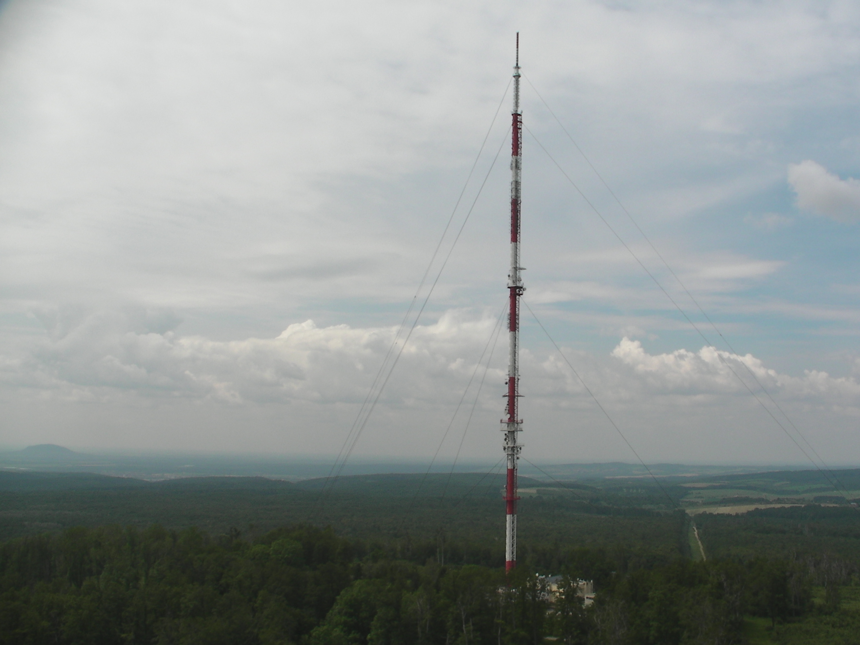 Kab-hegyi kilátás